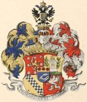 Rosenkampffi suguvõsa vabahärravapp